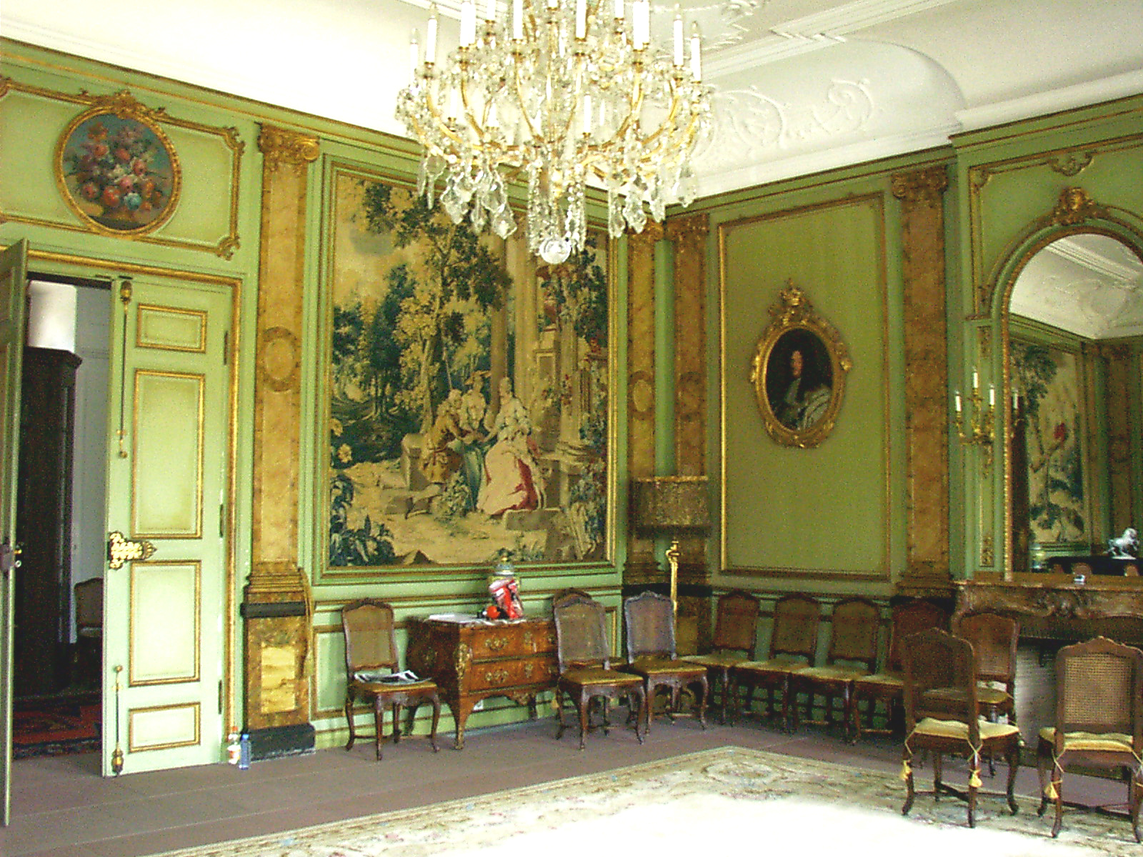 Riehen Wenken Erdgeschoss mittlerer grosser Saal